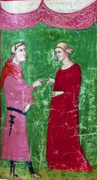 WElf V. a Matylda Toskánská